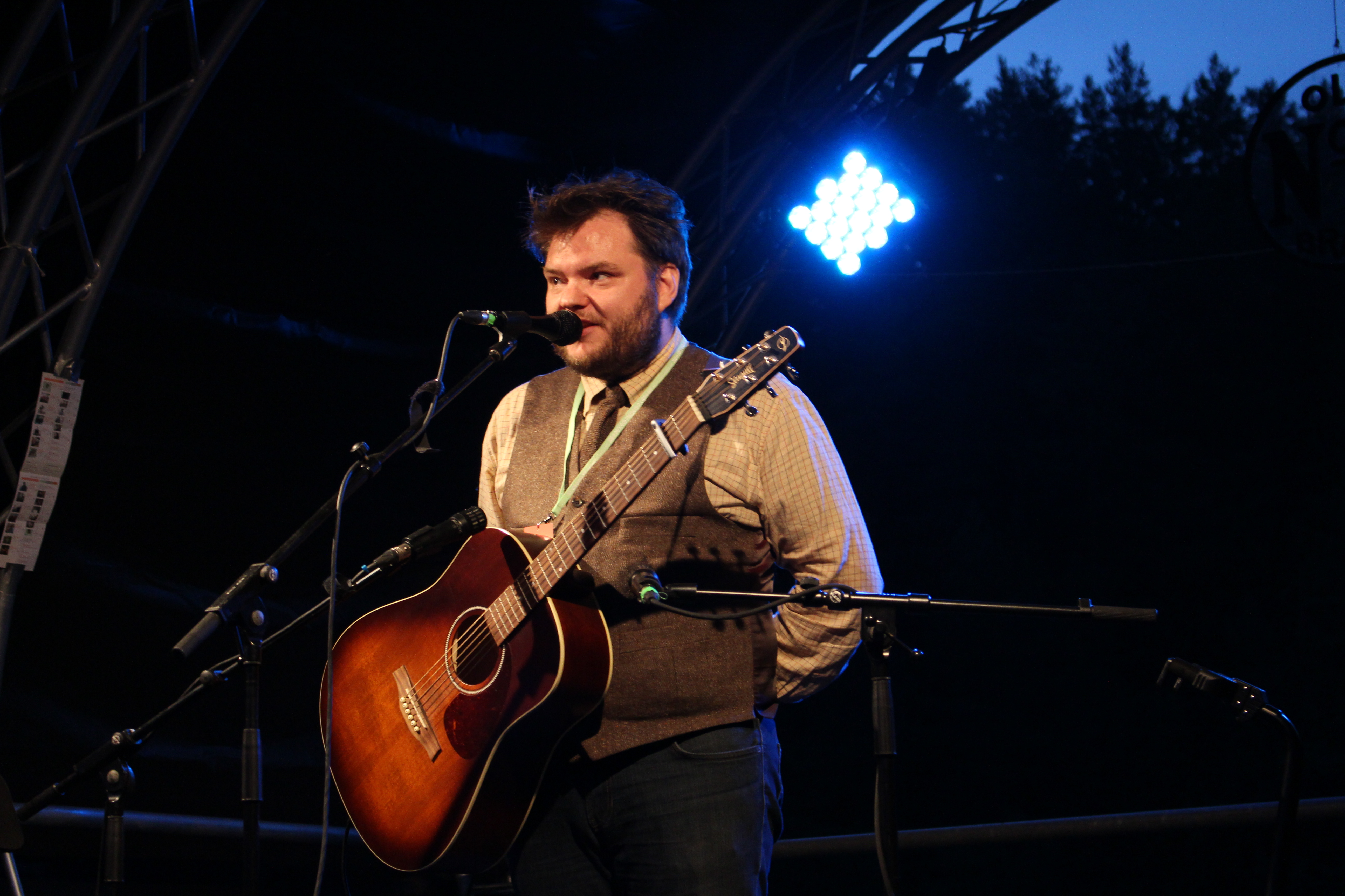 Festivalsommer This photo was created with the support of donations to Wikimedia Deutschland in the context of the CPB project "Festival Summer".